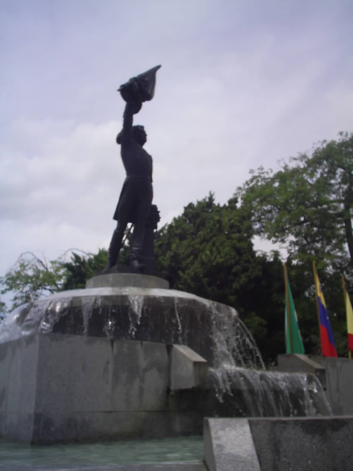 Monumento a Atanasio Girardot, Plaza Girardot de Maracay, Venezuela